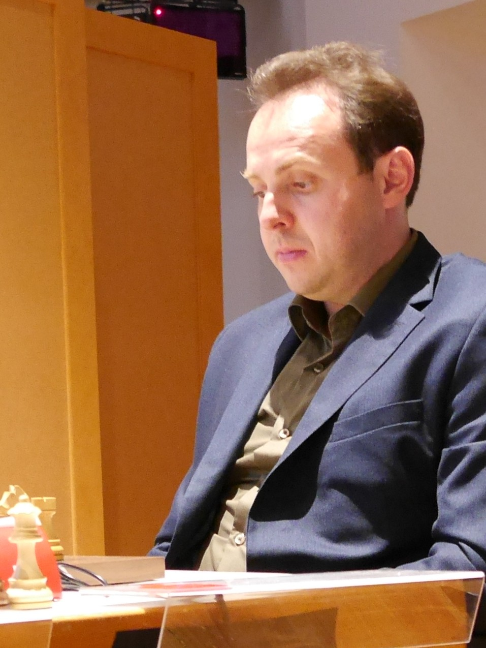 Evgeniy Najer, Dortmunder Schachtage 2016.